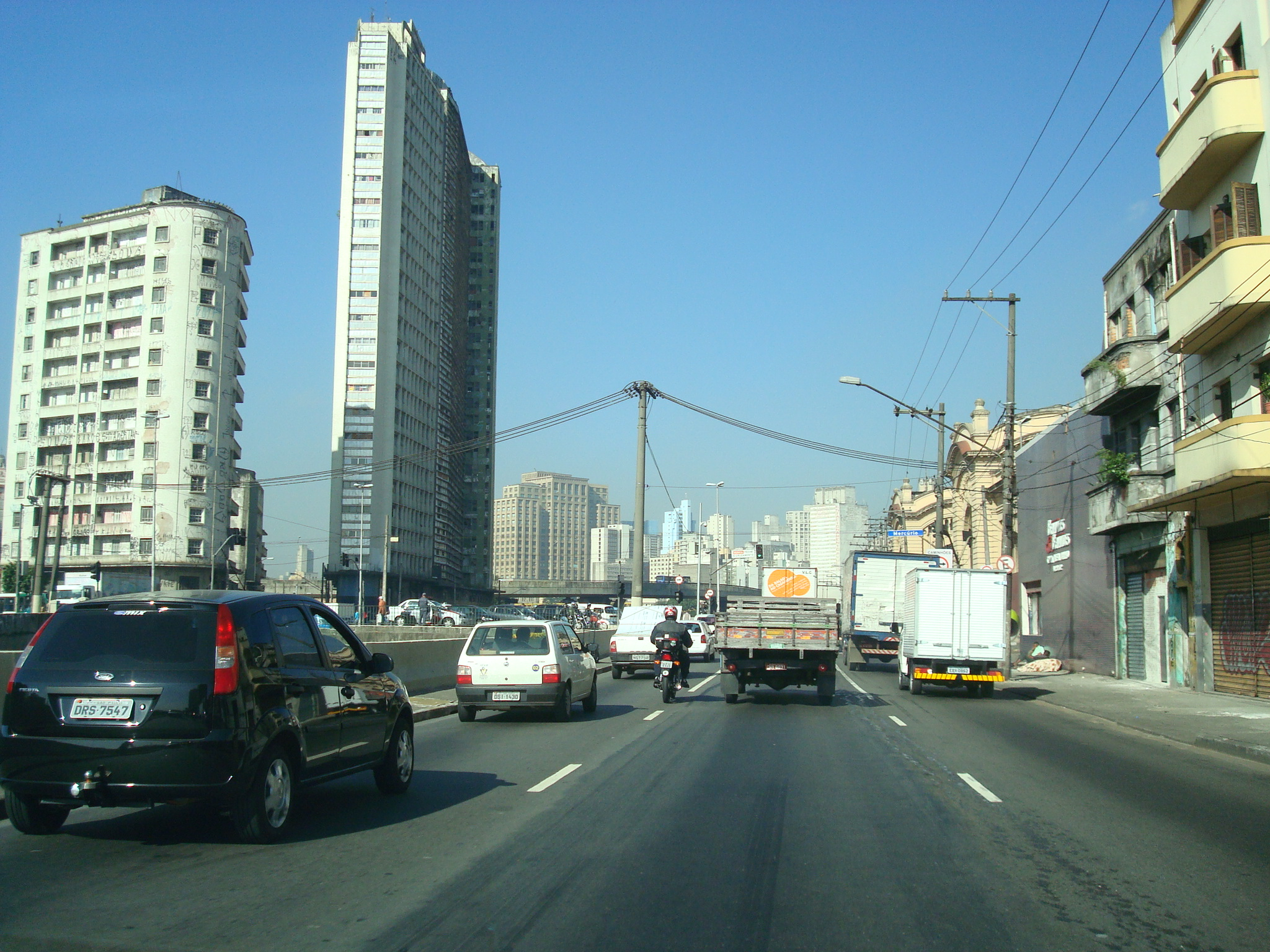 Avenida do Estado, aproximando-se da Região central de São Paulo, esquina com a Avenida Mercúrio. À esquerda, junto ao segundo prédio, o Edifício São Vito. À direita, o Mercado Municipal. Ao fundo, o Viaduto Diário Popular e os esdifícios da região da Praça da Sé.